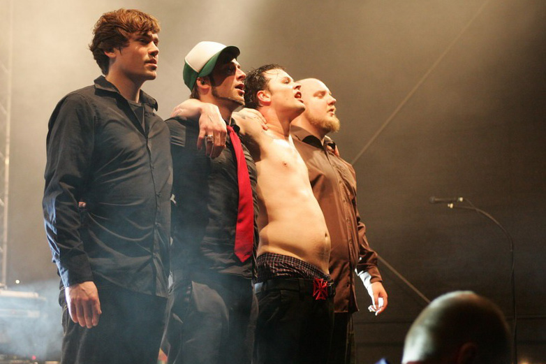 4LYN auf dem Mach1 Festival 2007